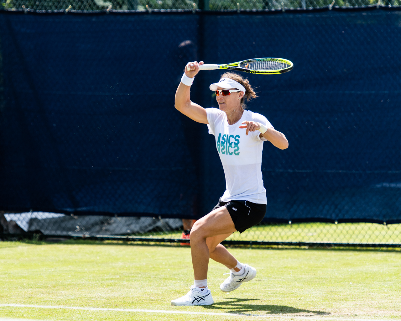 Sam Stosur